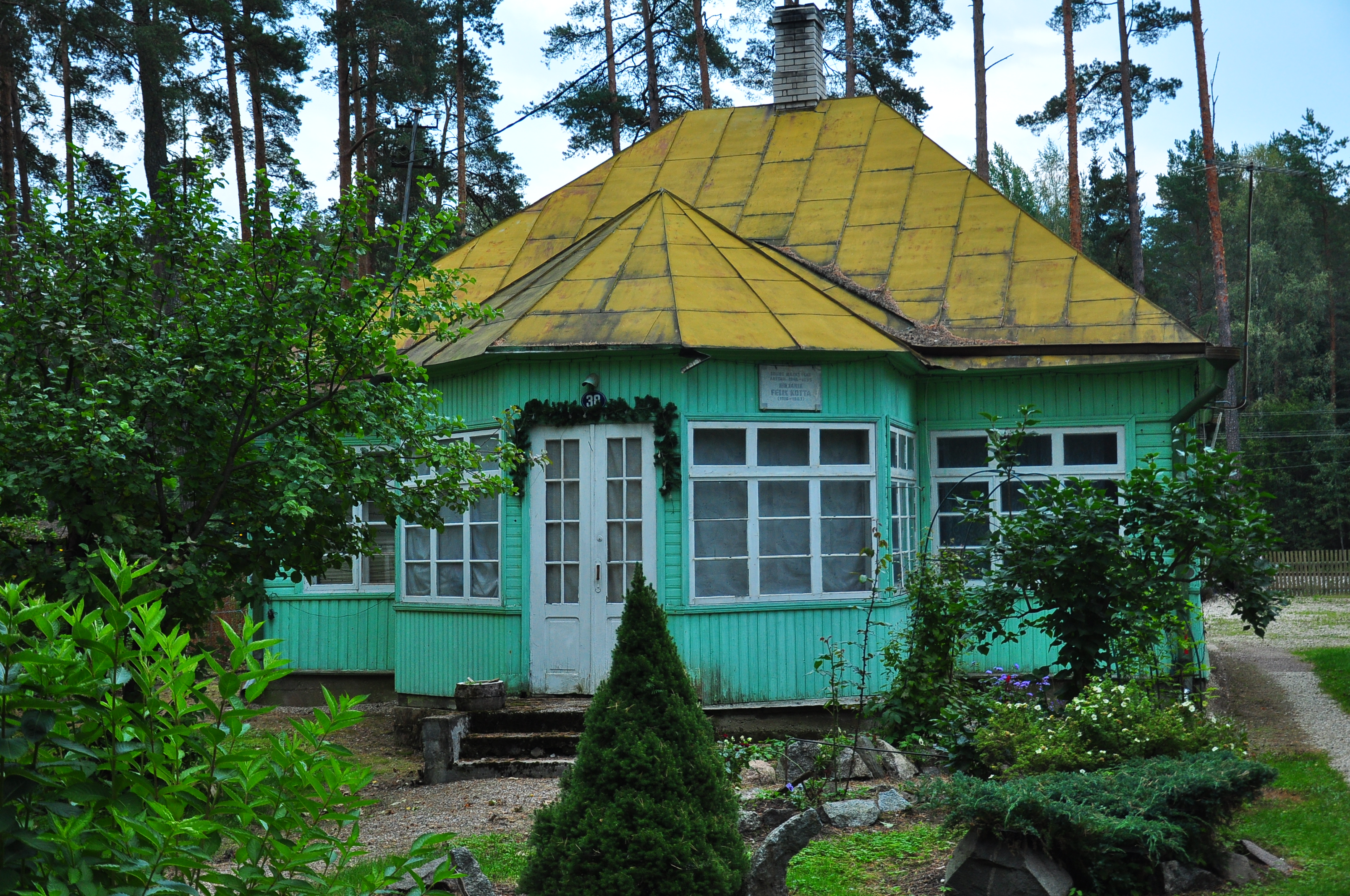 Elamu Elvas Pargi 38, 1920-1930.a.